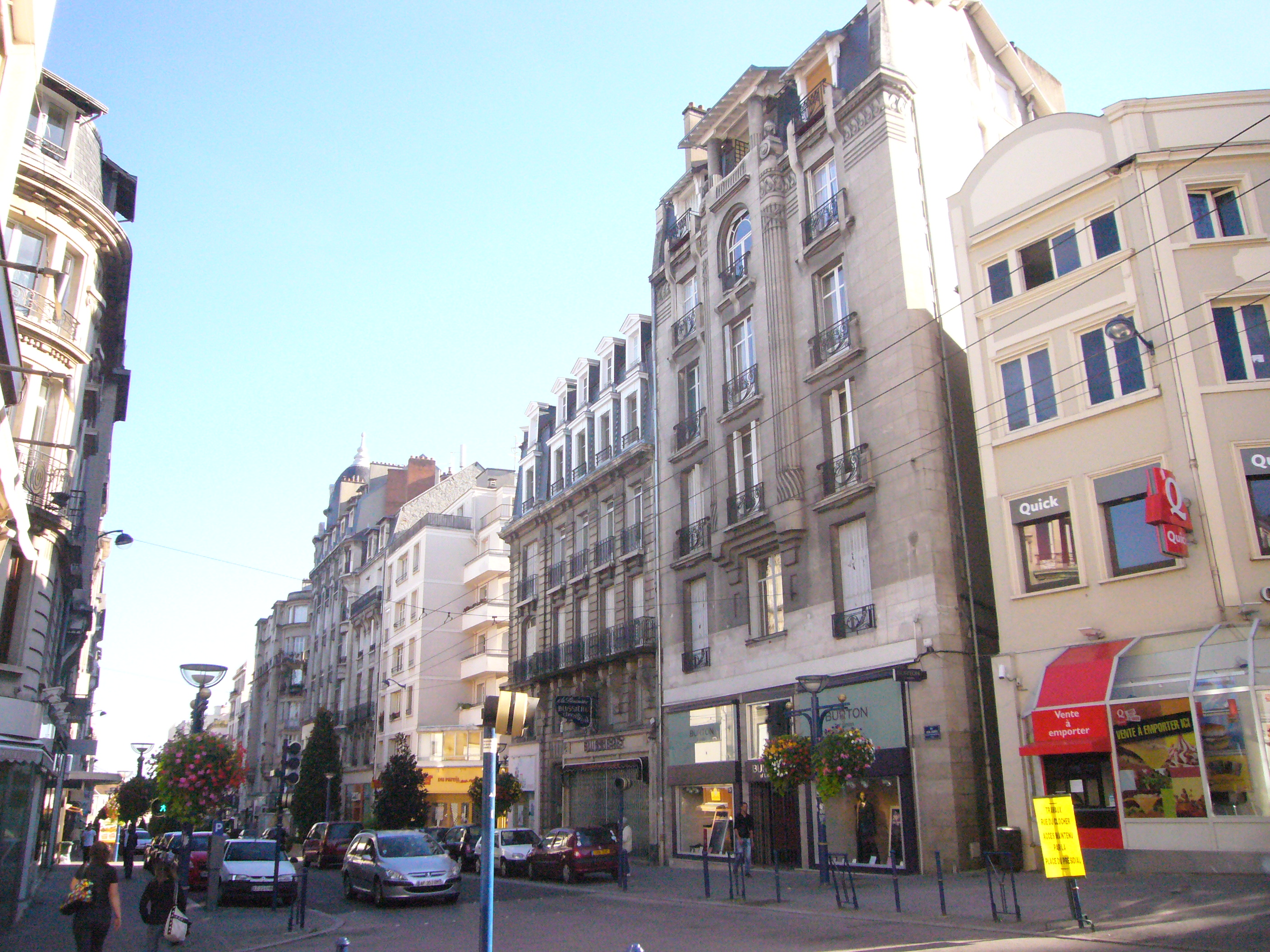 Vue partielle de la rue Jean-Jaurès, à Limoges (Haute-Vienne, France)